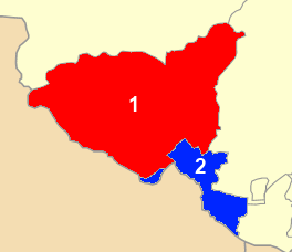 Χάρτης των ενοτήτων (και πρώην δήμων) από τις οποίες αποτελείται ο Δήμος Προσοτσάνης. Προσοτσάνης Σιταγρών